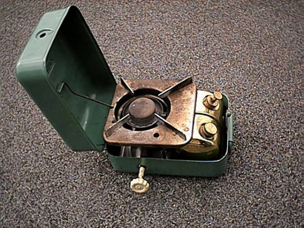 Fuhrmeister no 8. Norkprodusert primus fra etter 2. verdenskrig.